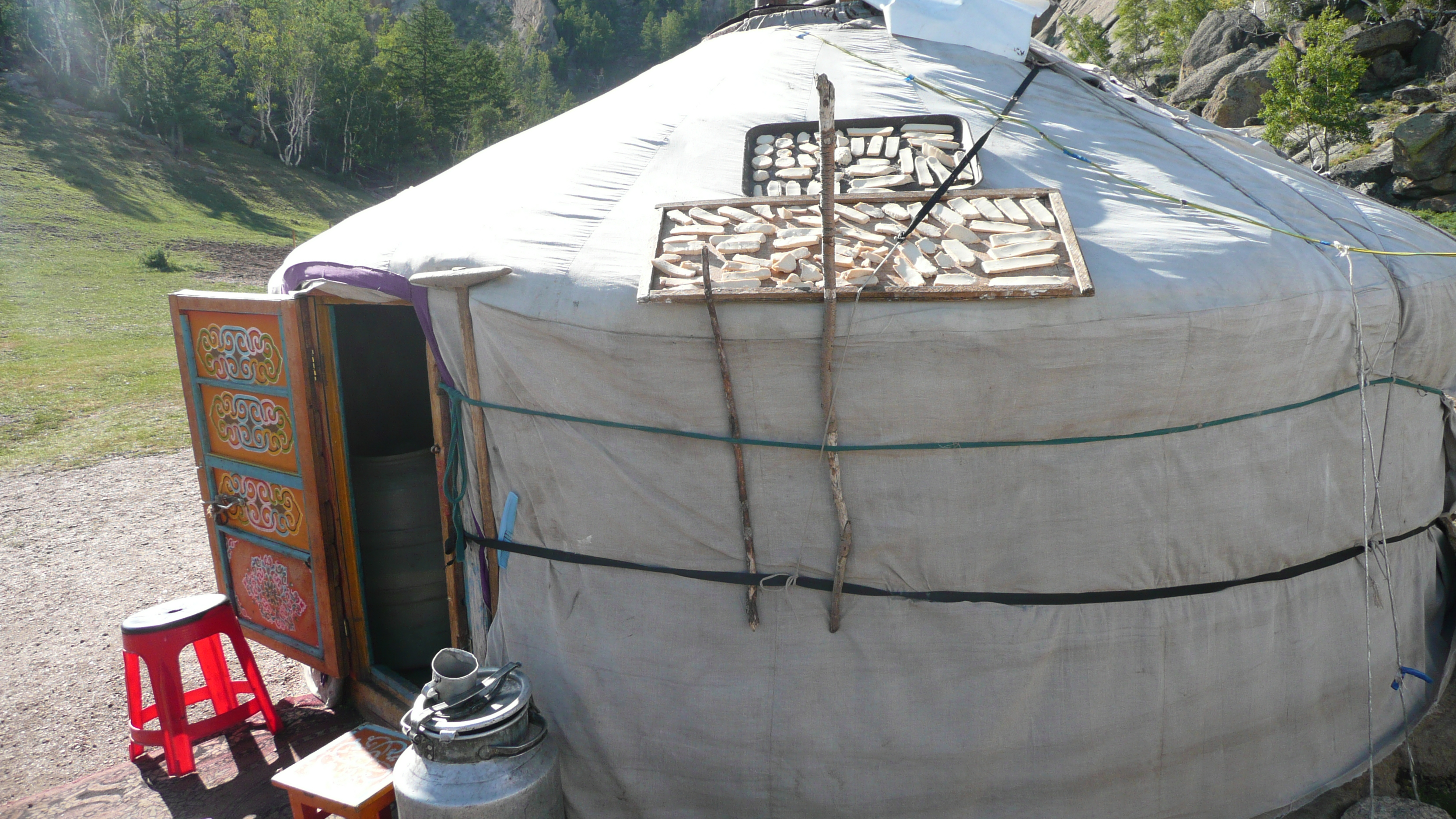 Aaruul